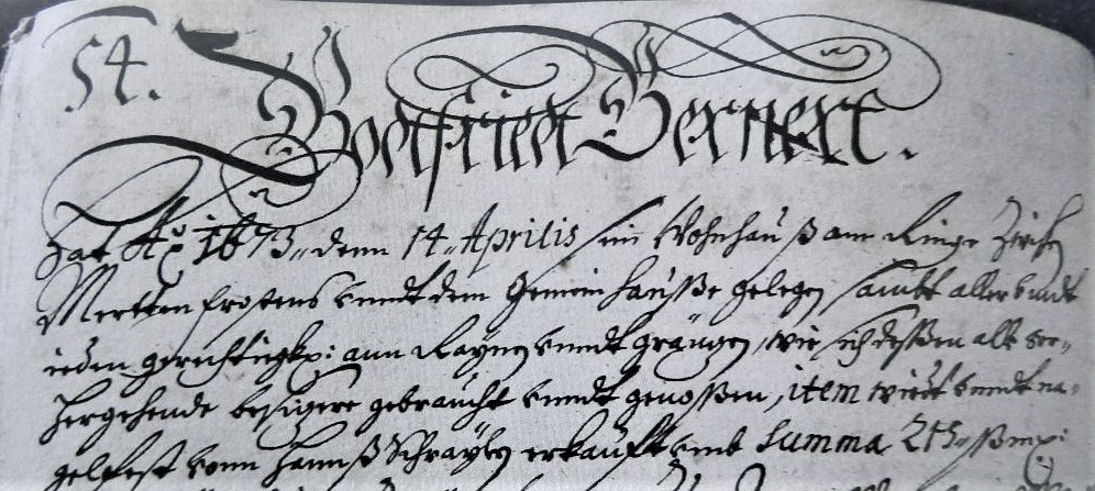 Die gleiche Person Gottfrieg Gernert im Arnauer Stadtbuch wie 1668, aber wieder in Initialen anders dargestellt